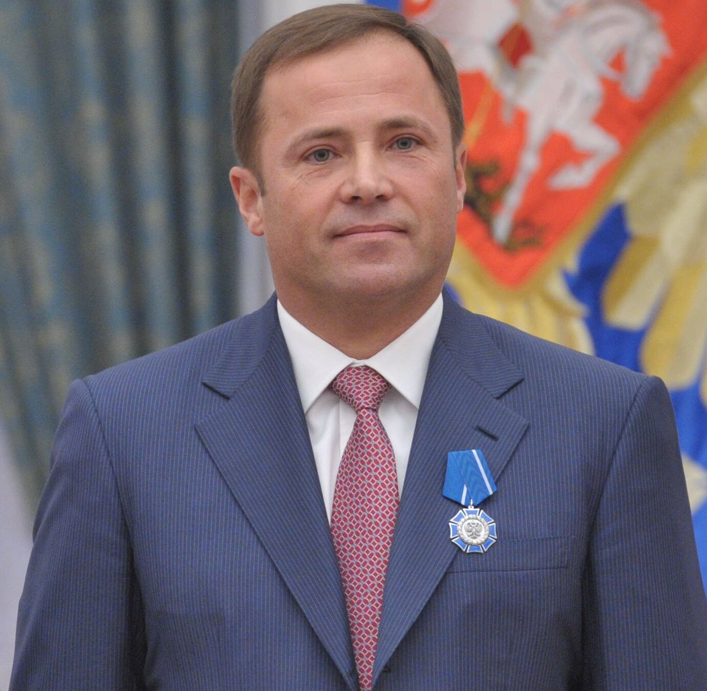 Игорь Комаров